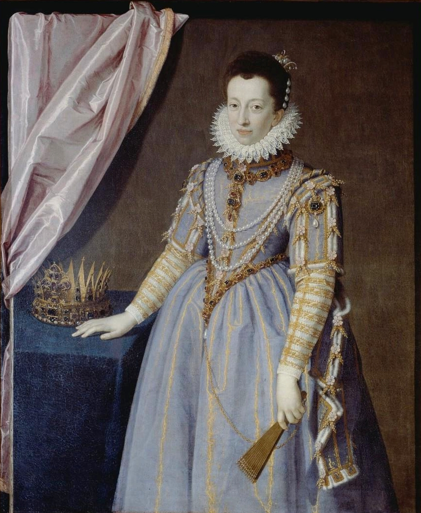 Official portrait